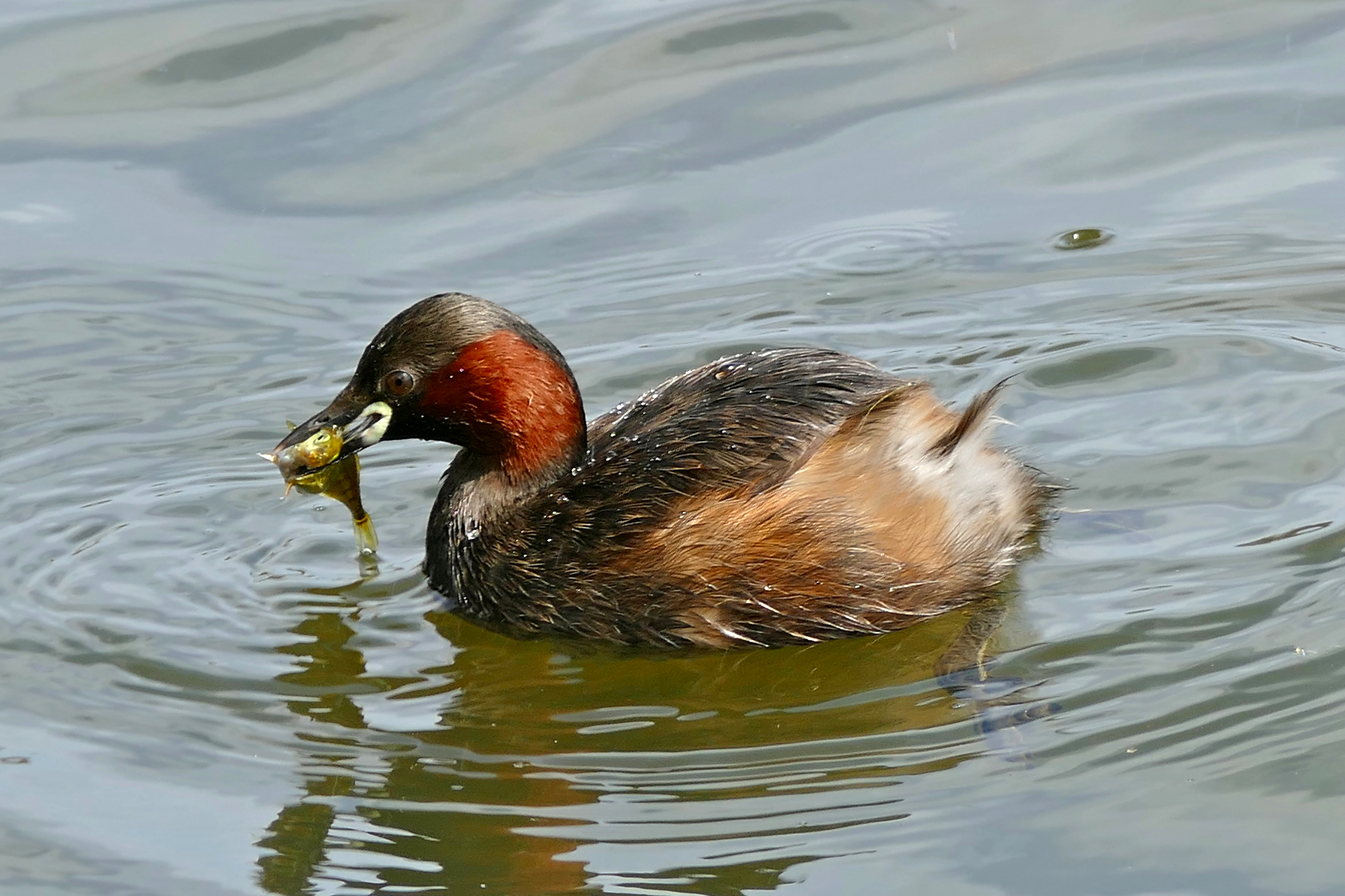 Aguait Quim Franch, Estany del Cortalet, Los Aiguamolls del' Empordà, Castelló d'Empúries, Catalunya, SPAIN